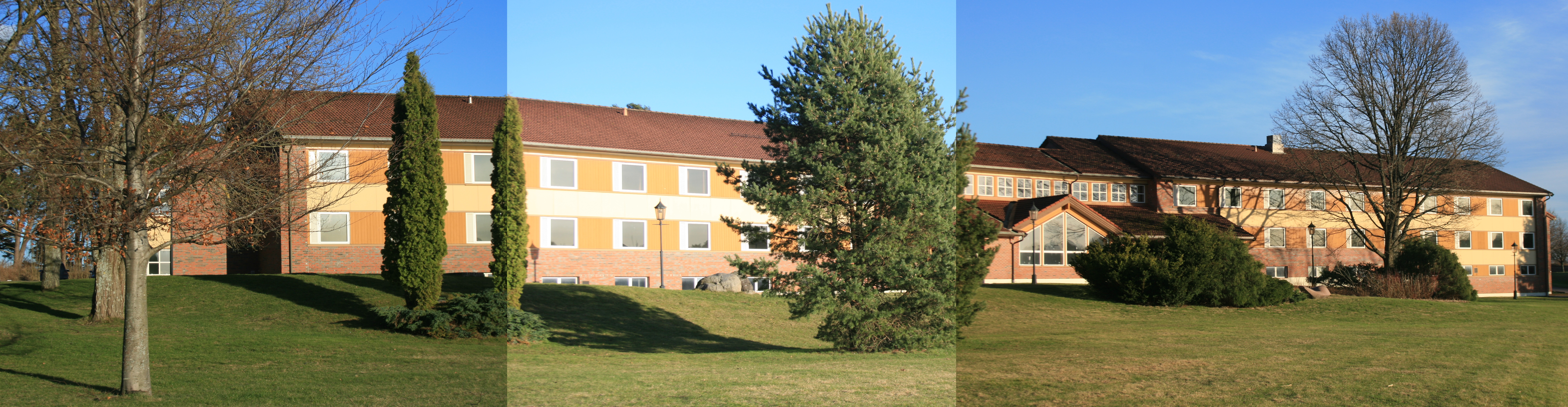 Panoramabilde av Freia, sett fra sjøen.